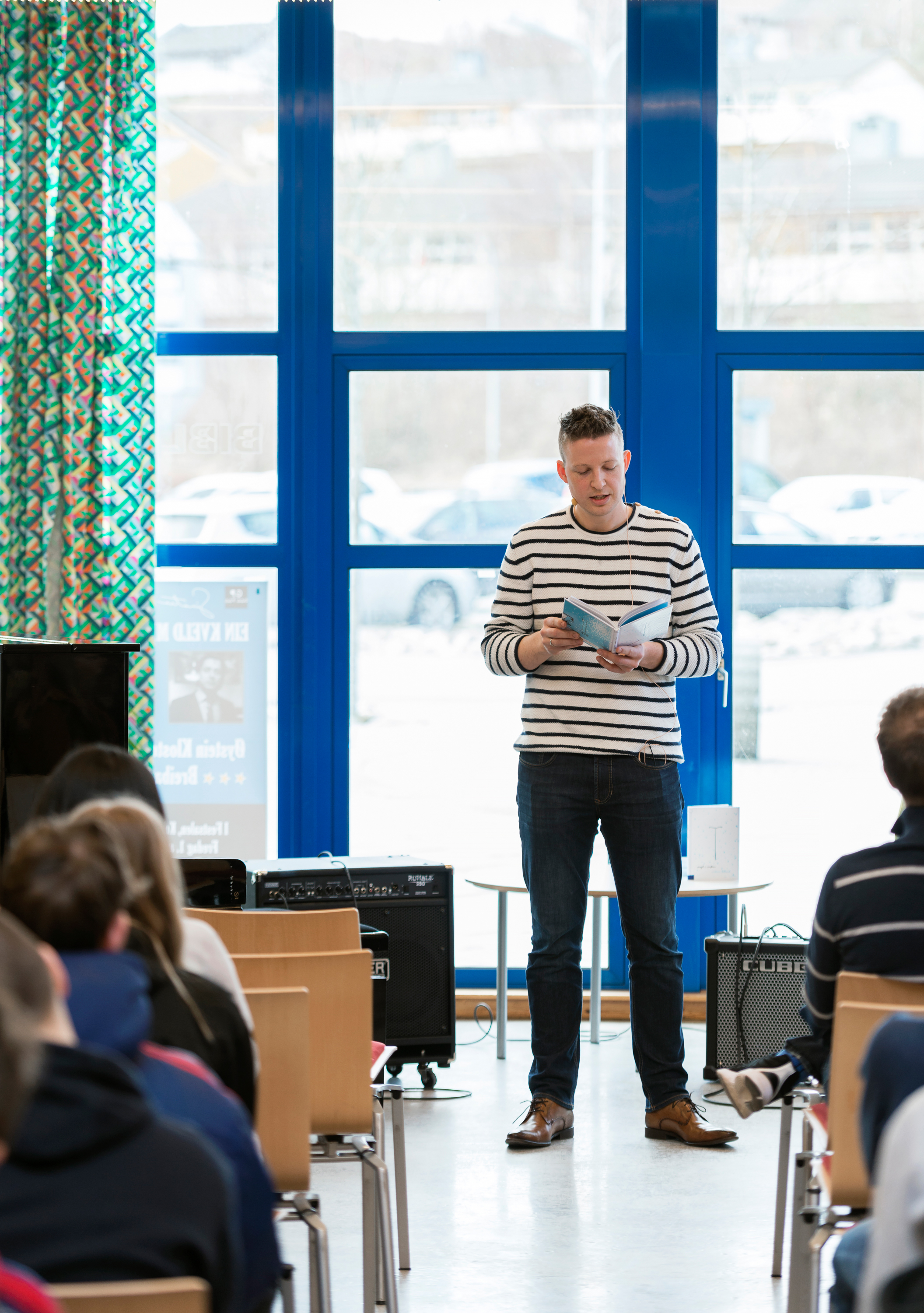 Anders Totland under lanseringen av ungdomsromanen Engel i snøen på Kvinnherad bibliotek. Foto: Lars Martin Teigen